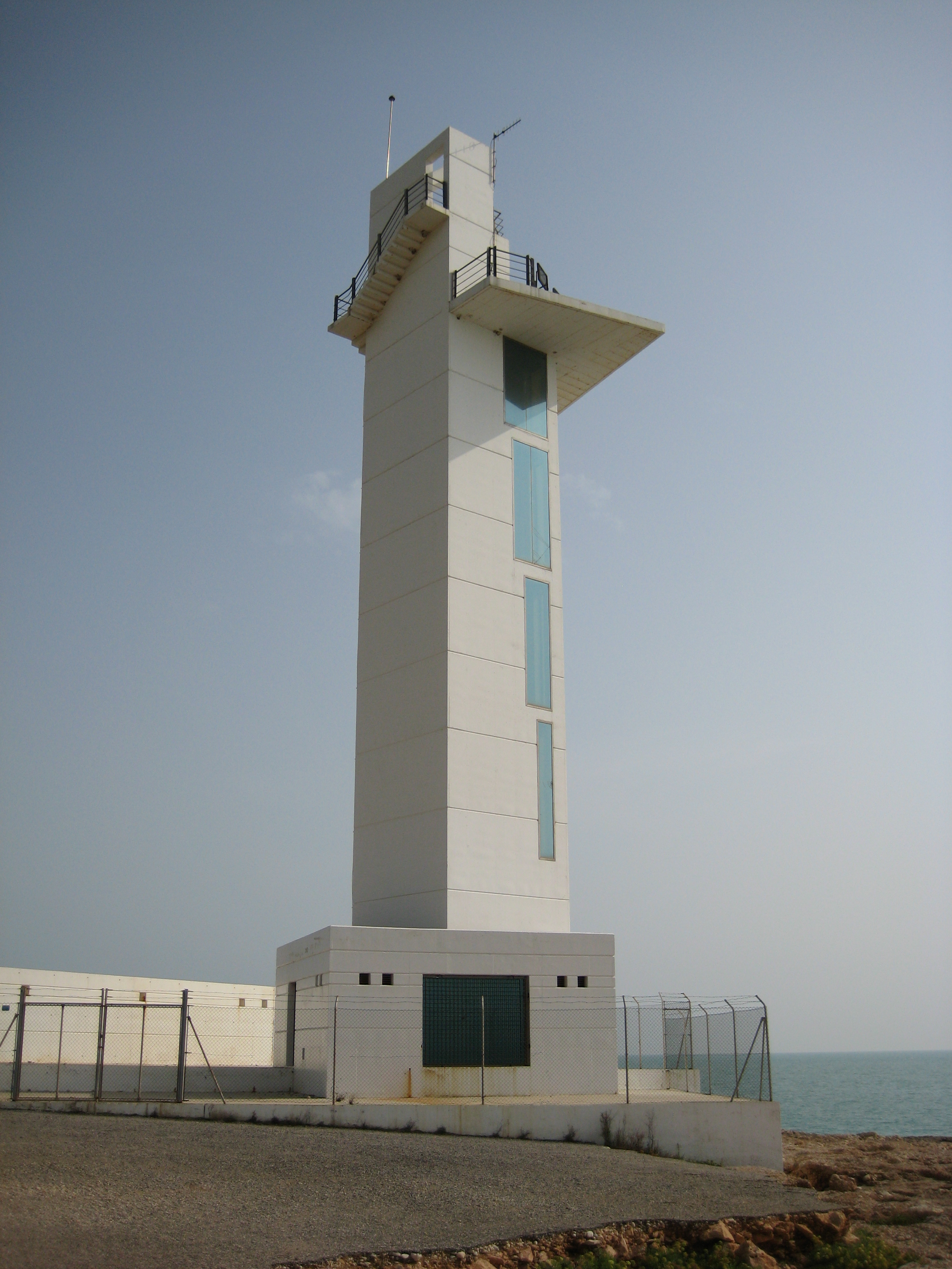 Far a Alcossebre, al municipi d'Alcalà de Xivert